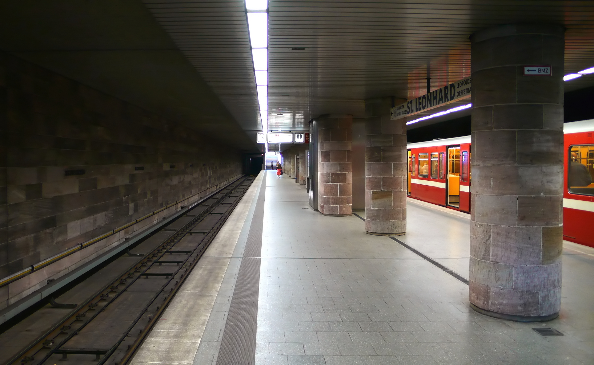 Nürnberg: U-Bahnhof St. Leonhard der U-Bahn Nürnberg, Bahnsteigebene, Blick von Süden